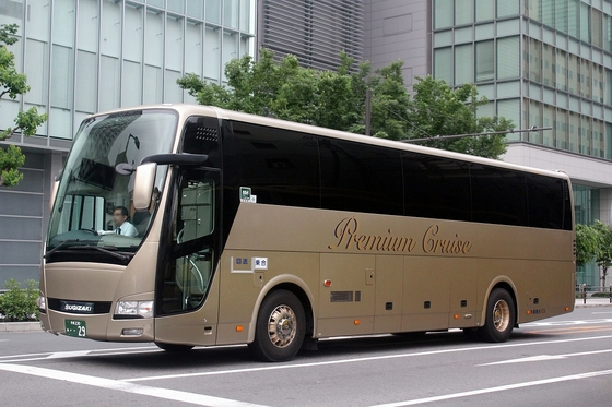 トイレ付き車両